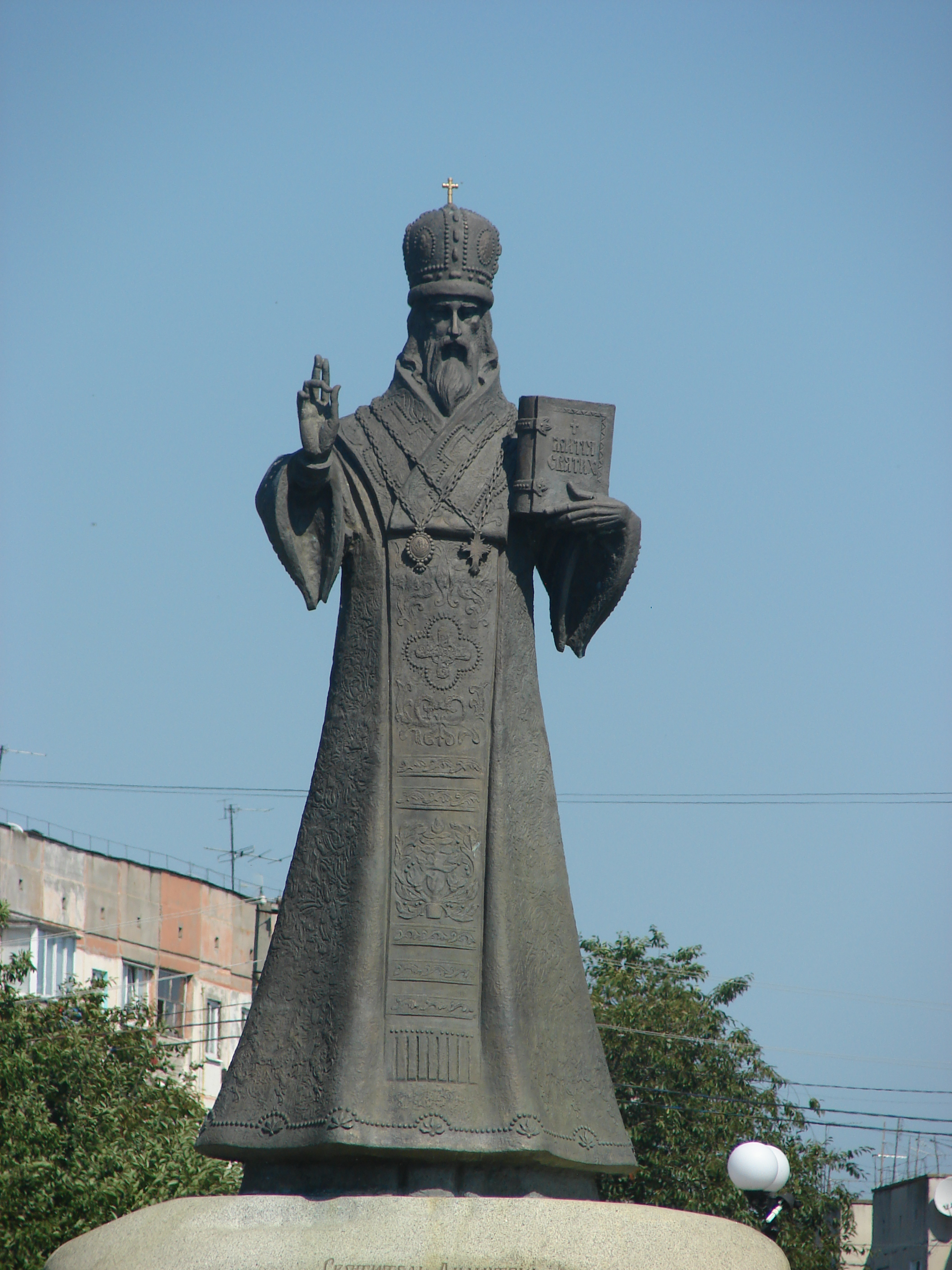 Пам'ятник Дмитру Тупталу (святому Димитрію Ростовському) у Макарові